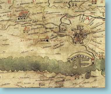 La Tabula Peutingeriana è considerata la copia di un itinerarium di epoca tardo-imperiale, probabilmente ripreso da un modello anteriore, appartenuta nel Cinquecento all'umanista tedesco Konrad Peutinger.